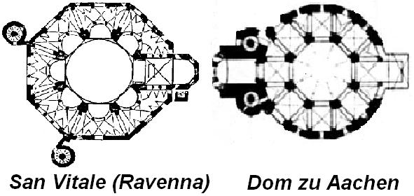 Vergleich von San Vitale in Ravenna mit dem Aachener Münster